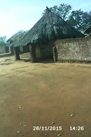 Dakkere